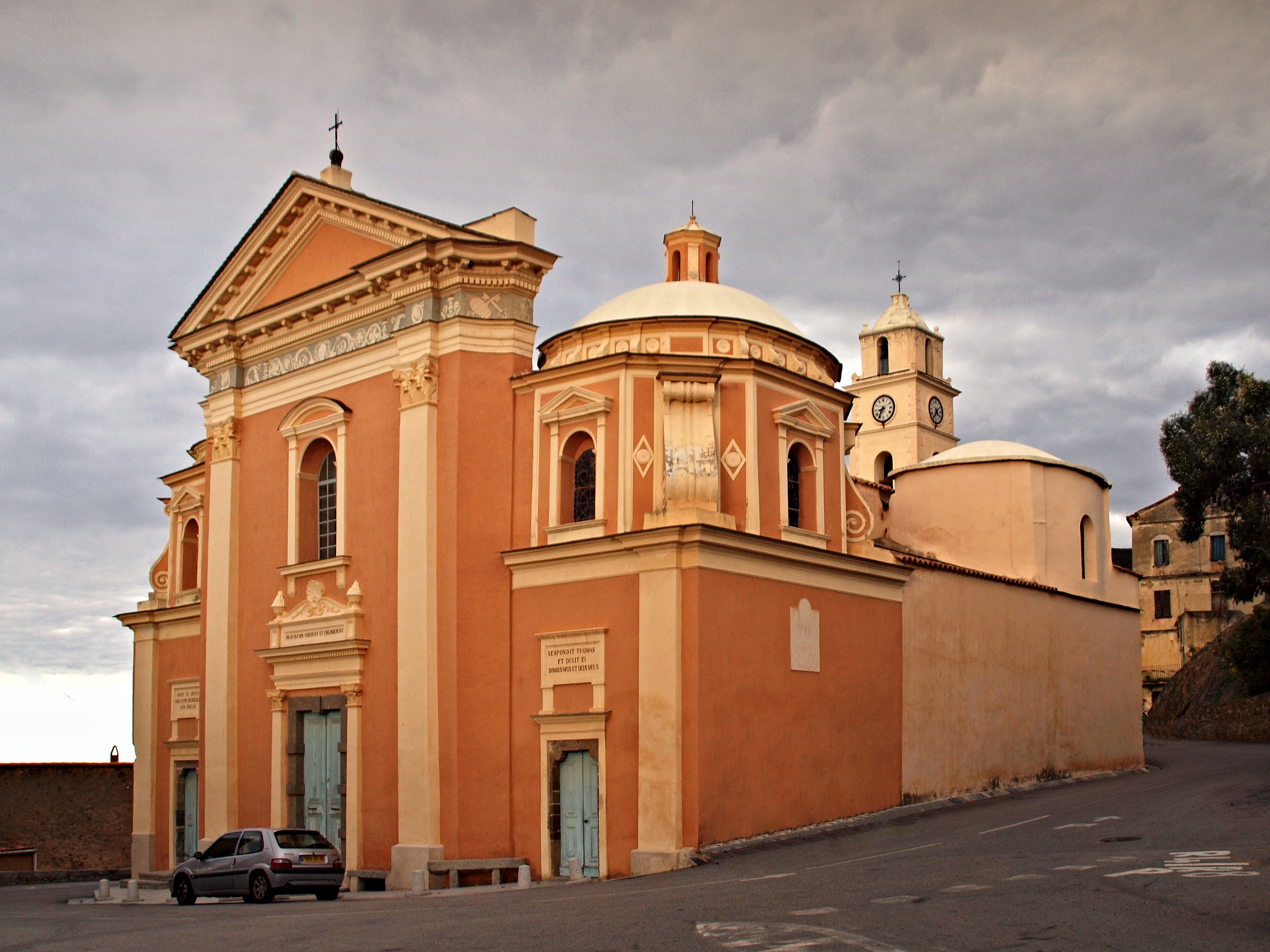 Belgodère - Eglise paroissiale St-Thomas